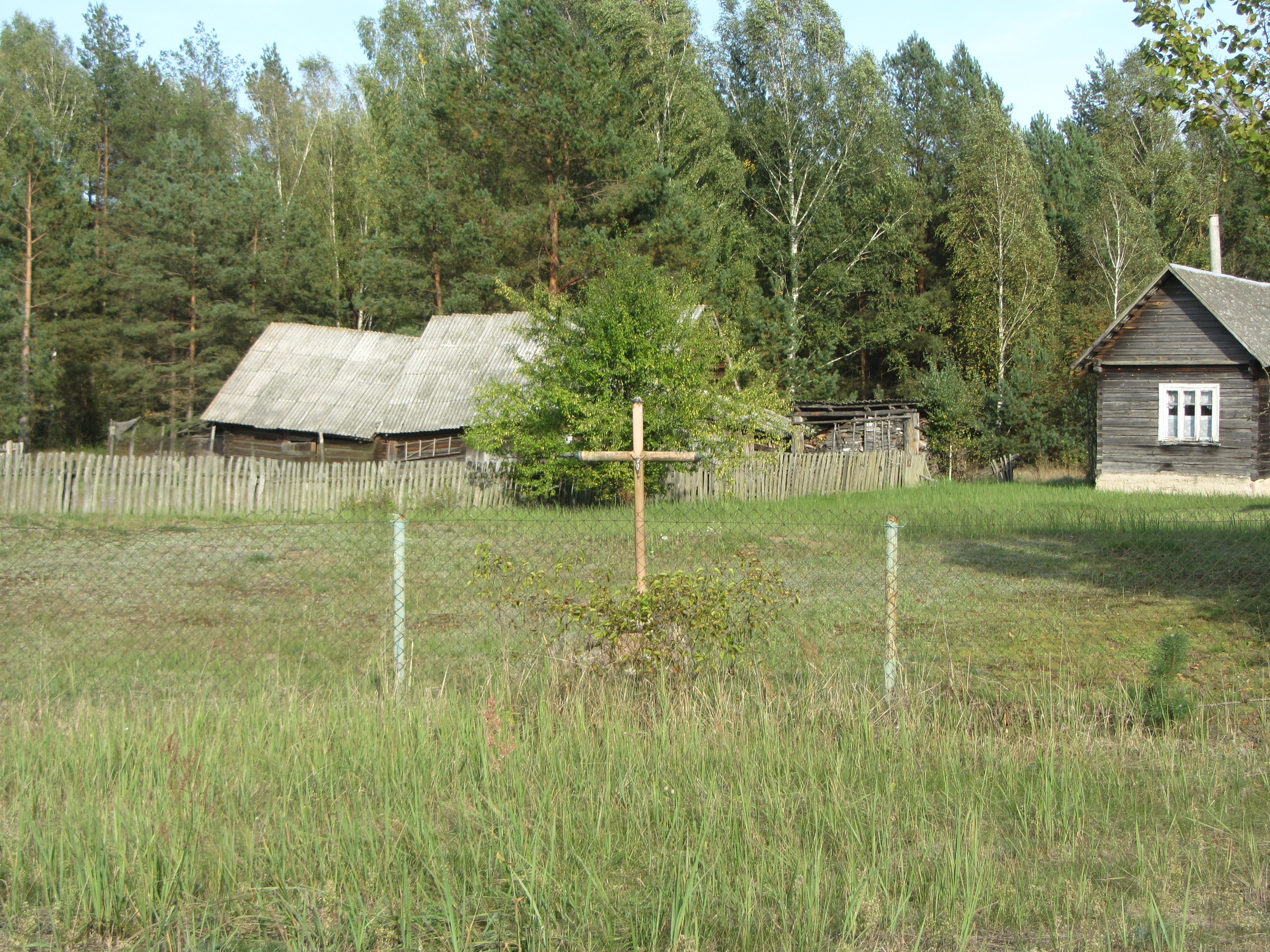 Ašašninkai, Lithuania